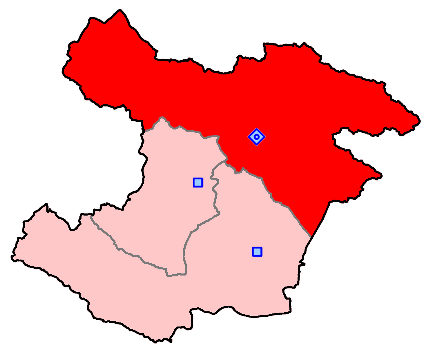 حوزهٔ انتخاباتی قزوین، آبیک و البرز برای انتخابات مجلس شورای اسلامی